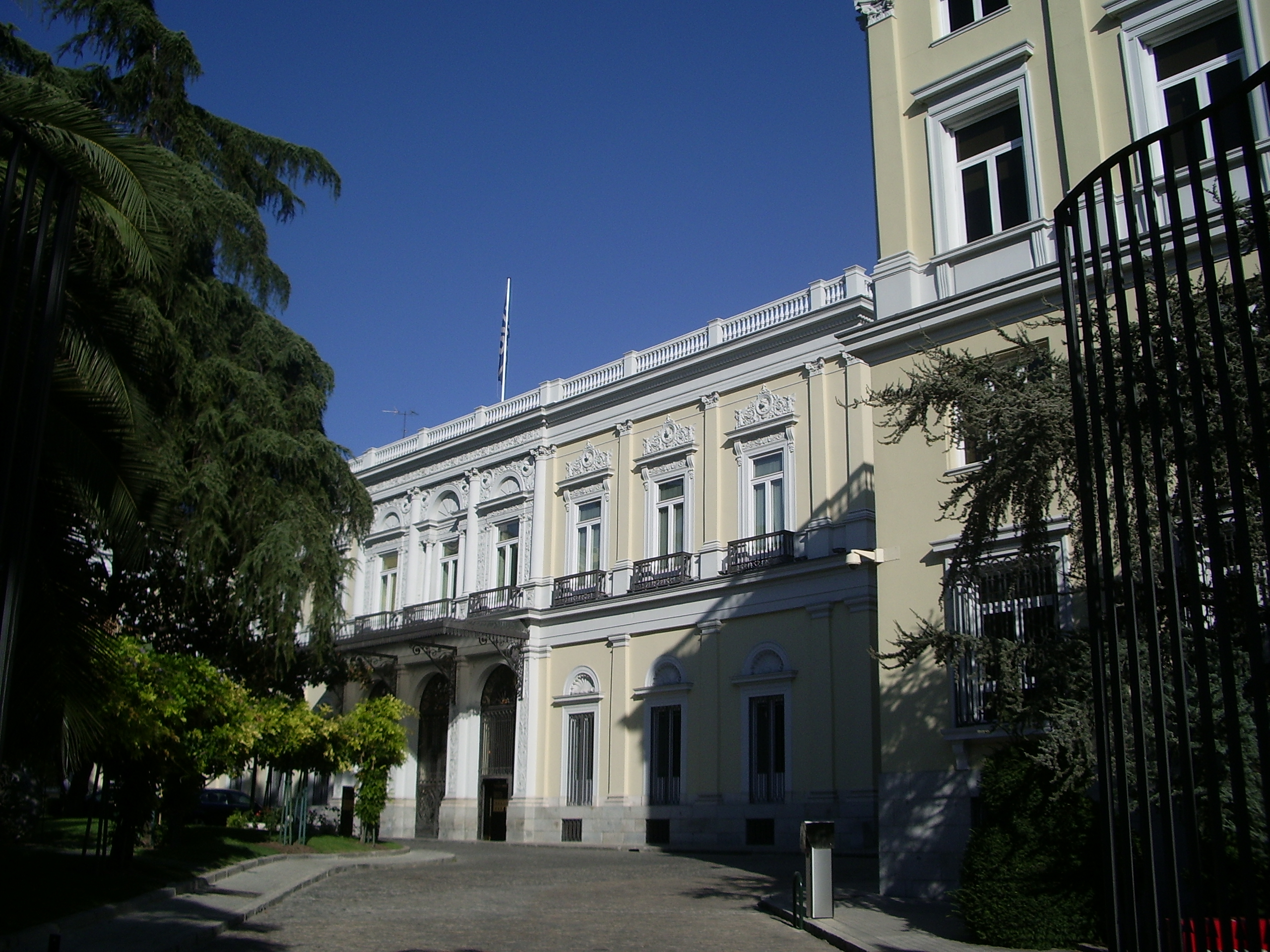 Palacio del Marqués de Salamanca (Fundación BBVA).